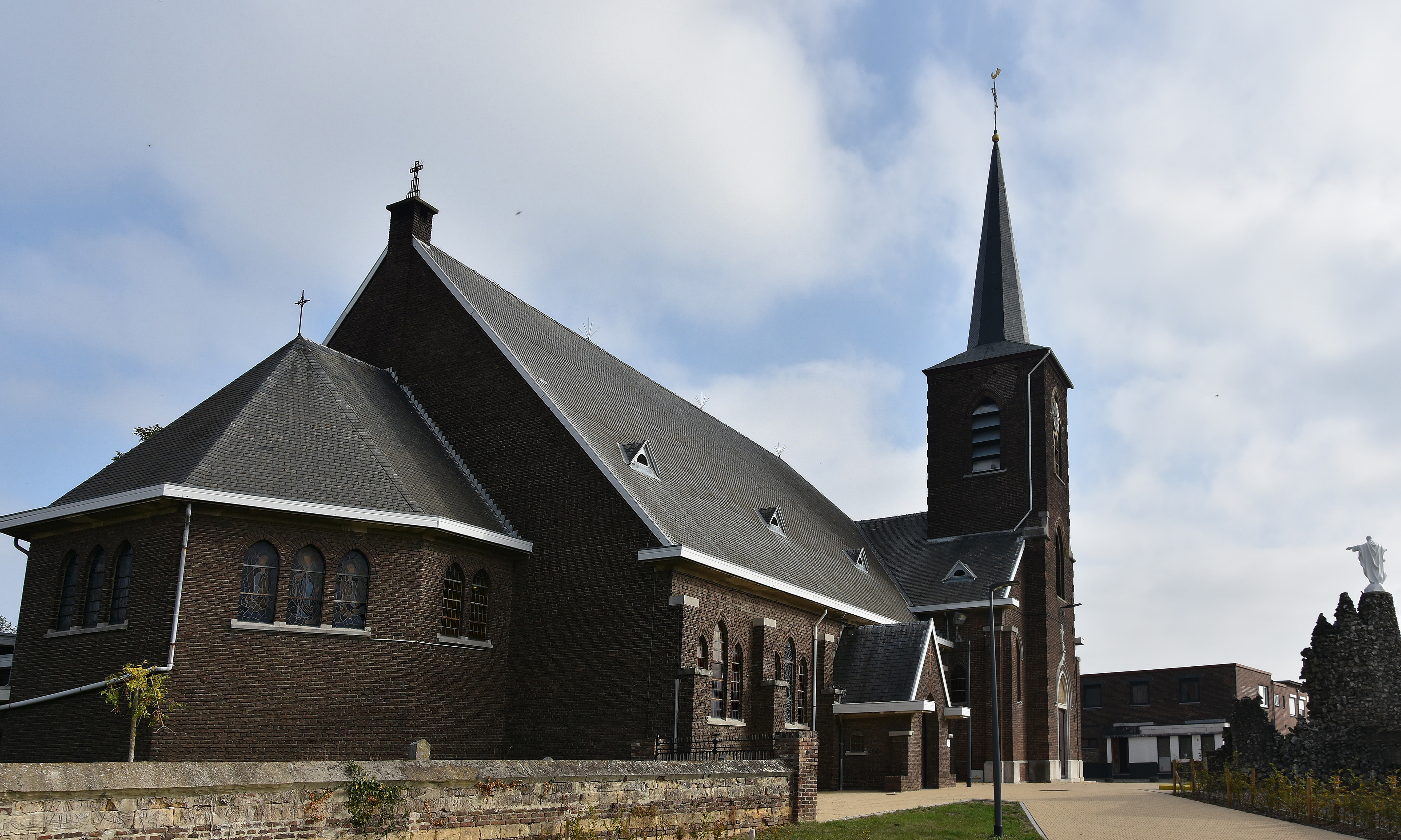 Sint-Niklaaskerk (Uikhoven) met vooraan het nieuwe gedeelte uit 1939 19-10-2018 This photo of immovable heritage has been taken in the Flemish Region